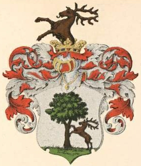 Fromholdi suguvõsa aadlivapp